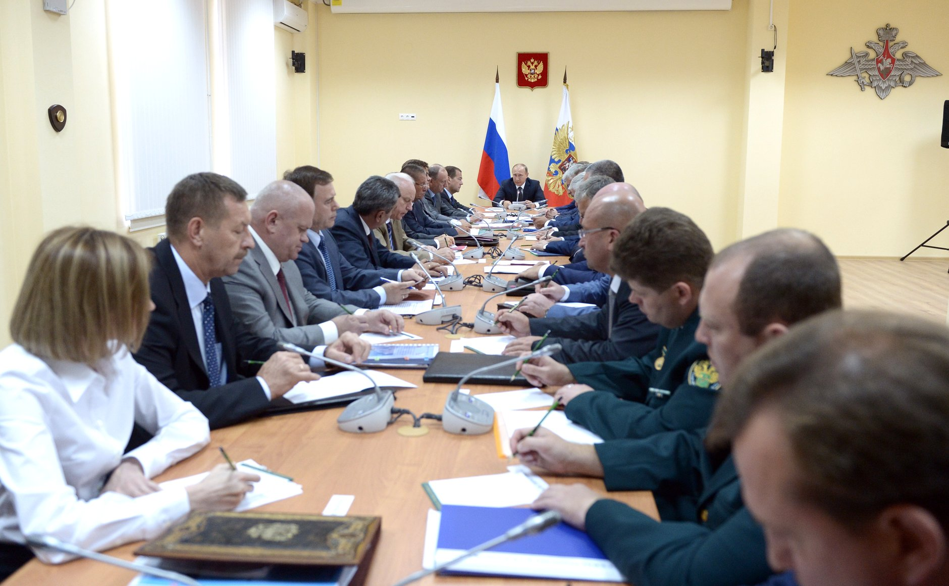 В Севастополе Владимир Путин провёл совещание по вопросам обеспечения законности и правопорядка в Крымском федеральном округе